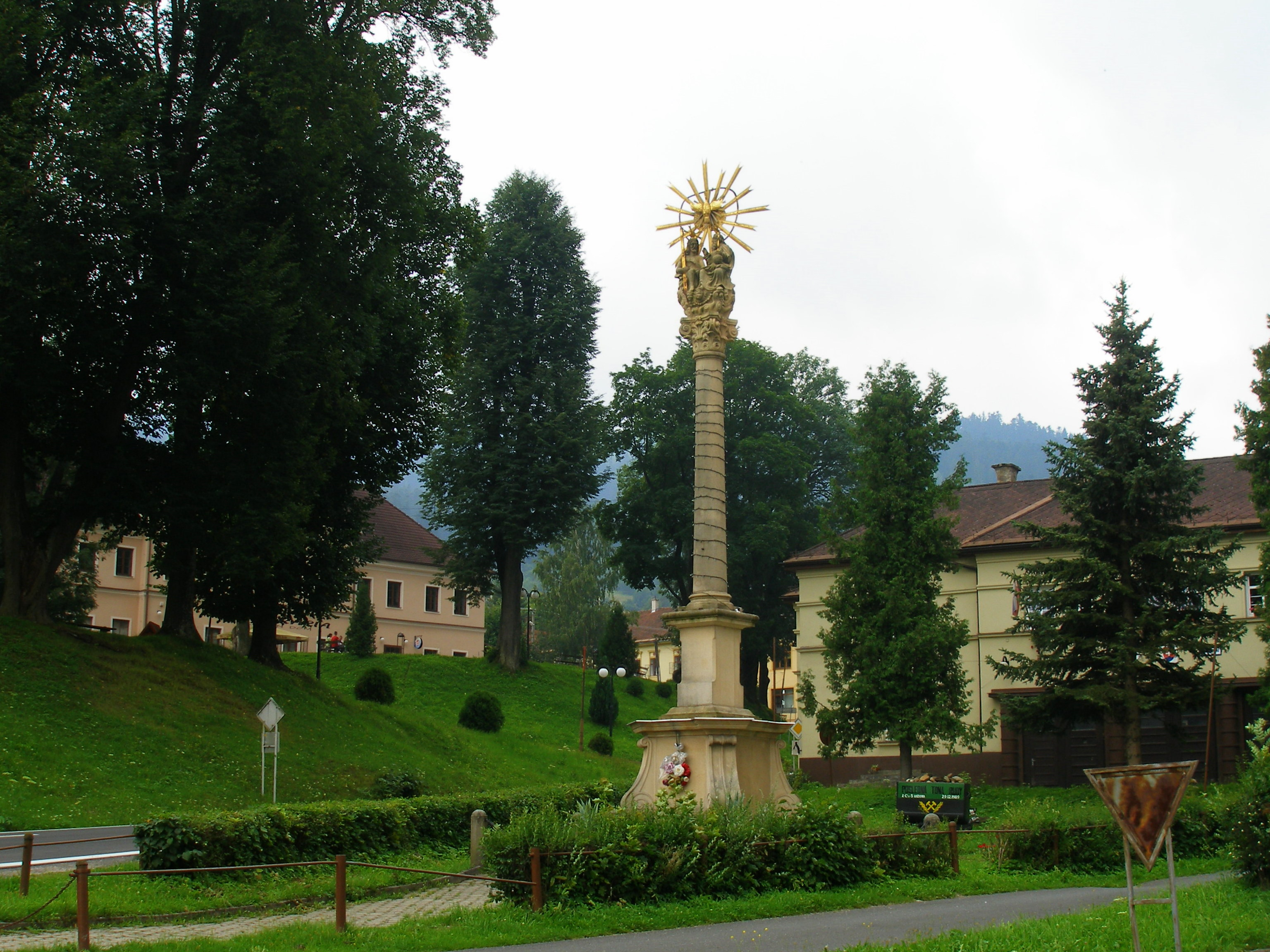 Obec Smolník, okres Gelnica.